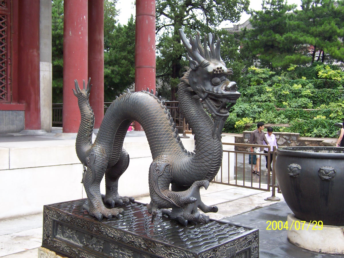 Socha čínského draka